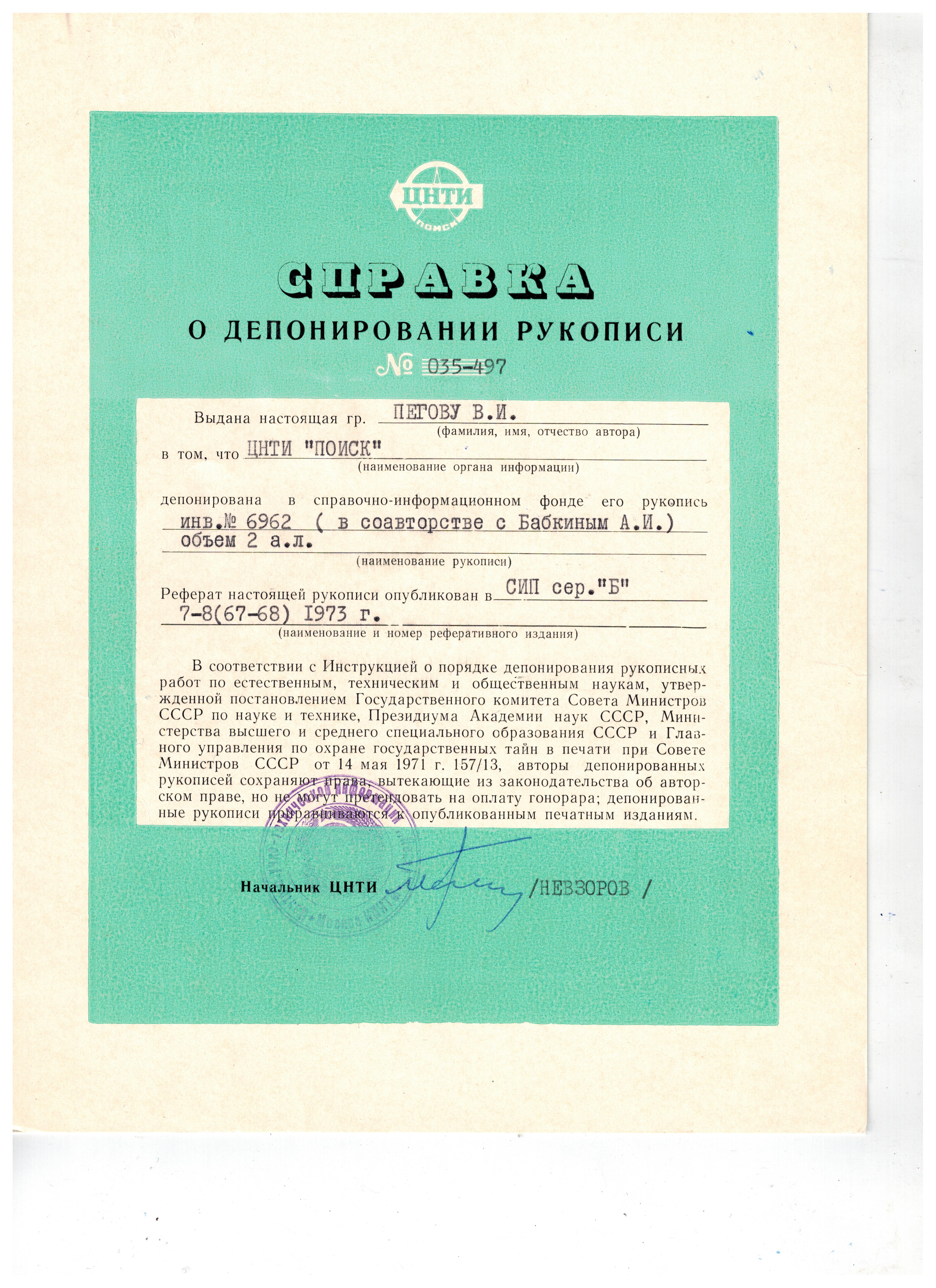 Сканированный документ. Дату (месяц и день) ставлю условно, т. к. документ датирован лишь годом.